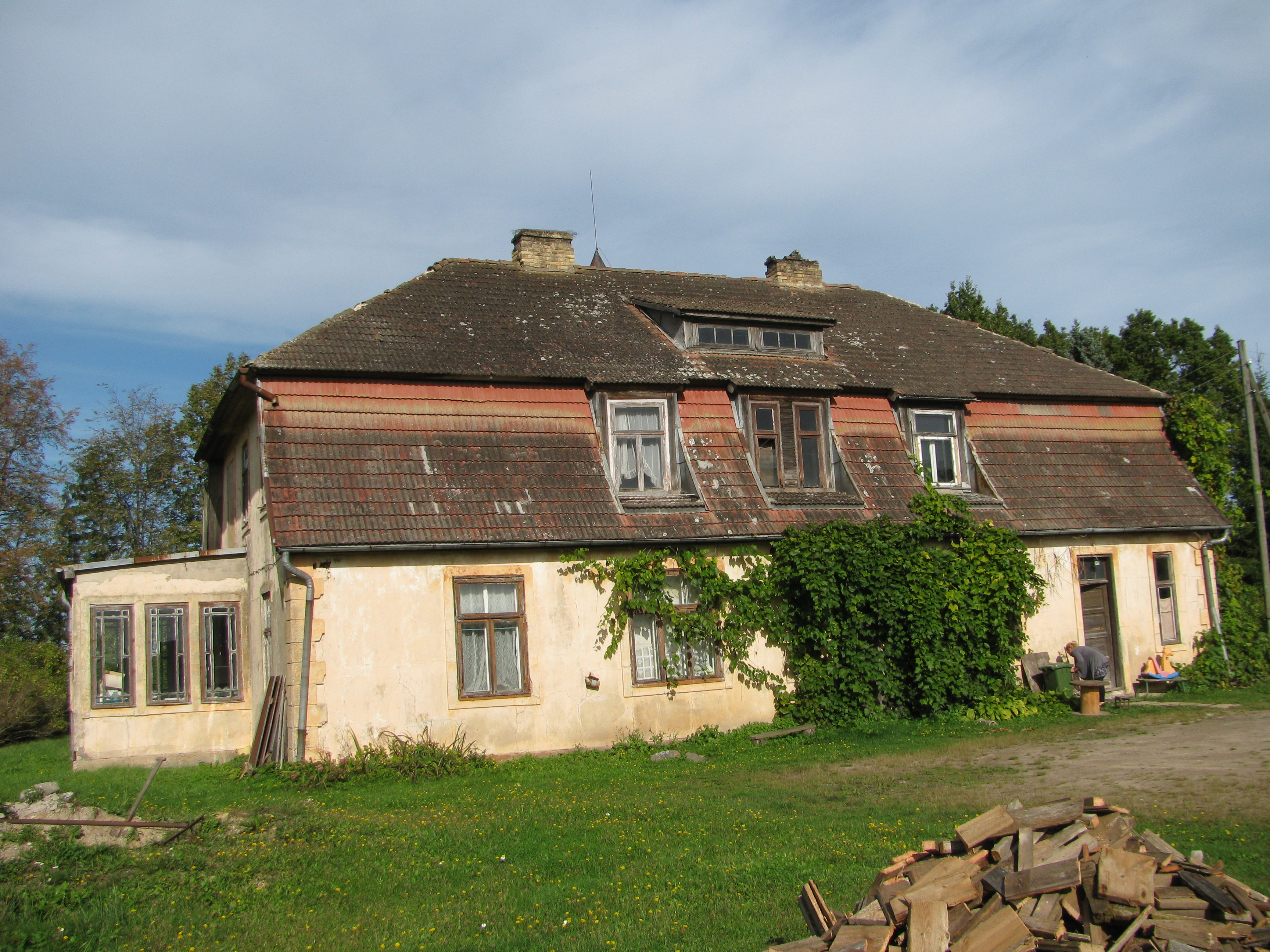 Dzīvojamā ēka "Pūri", Glūda